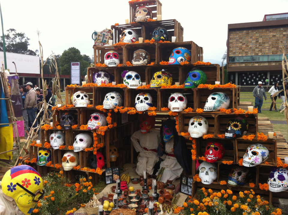 Mega Ofrenda del dia de muertos realizada en la UNAM, Mexico Df. Echa de calaveras de papel, flores de Zempoalxóchitl, velas, vinos, frutas y alfareria; Cosas tipicas en una ofrenda a algun familiar difunto.